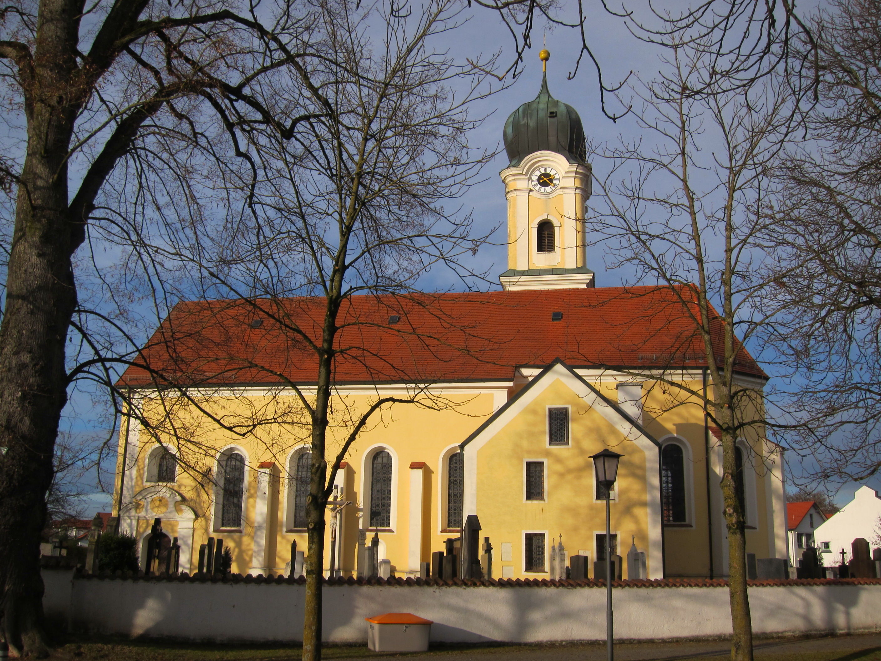 Mühldorfer Straße 5; kath. Pfarrkirche Mariä Heimsuchung; im Kern gotisch, barocke Umgestaltung 1755-66 von Balthasar Trischberger; mit Ausstattung.